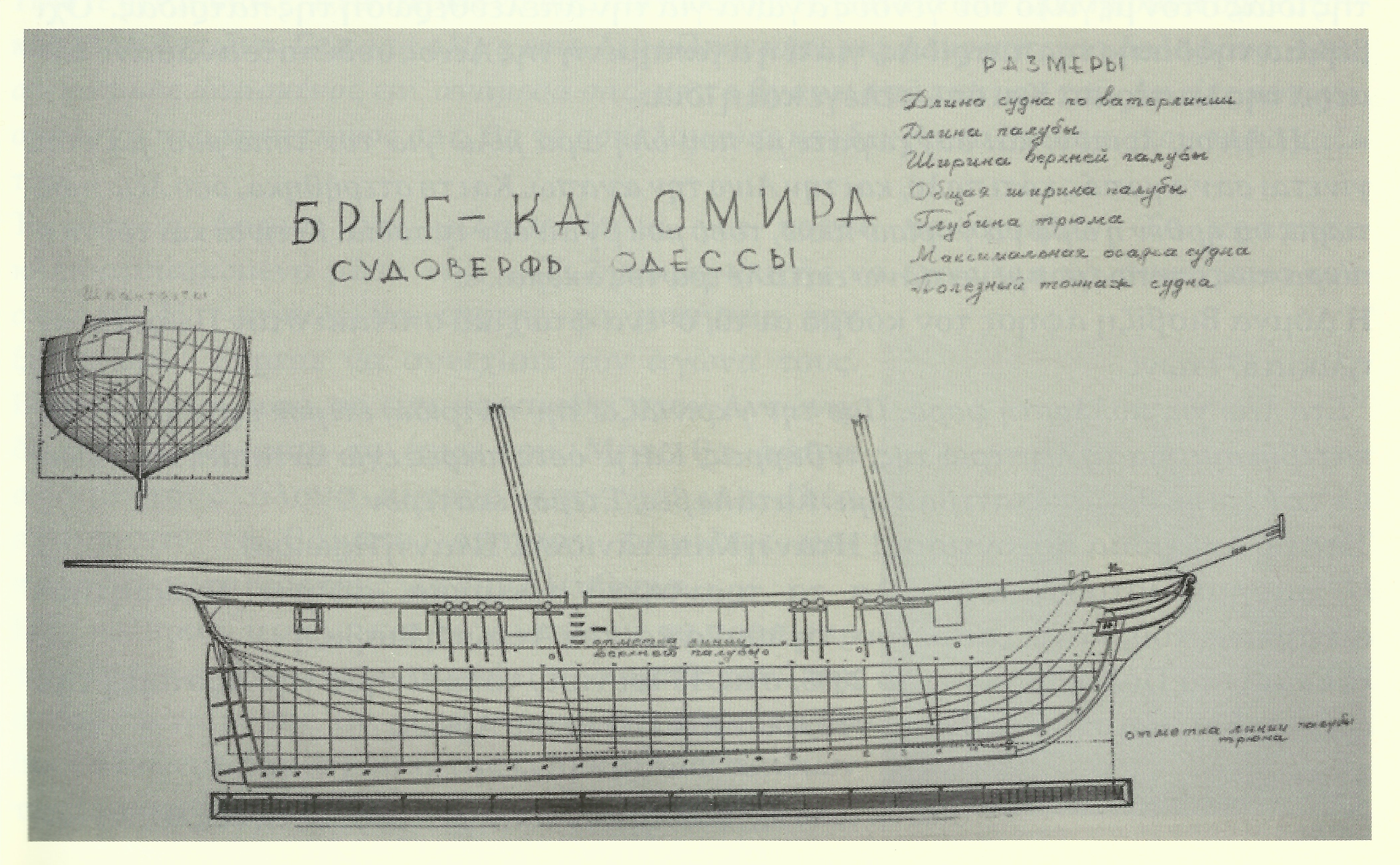 Σκίτσο της " Καλομοίρα" , Ναυτικό Μουσείο Οδησσού, στην Ουκρανία.